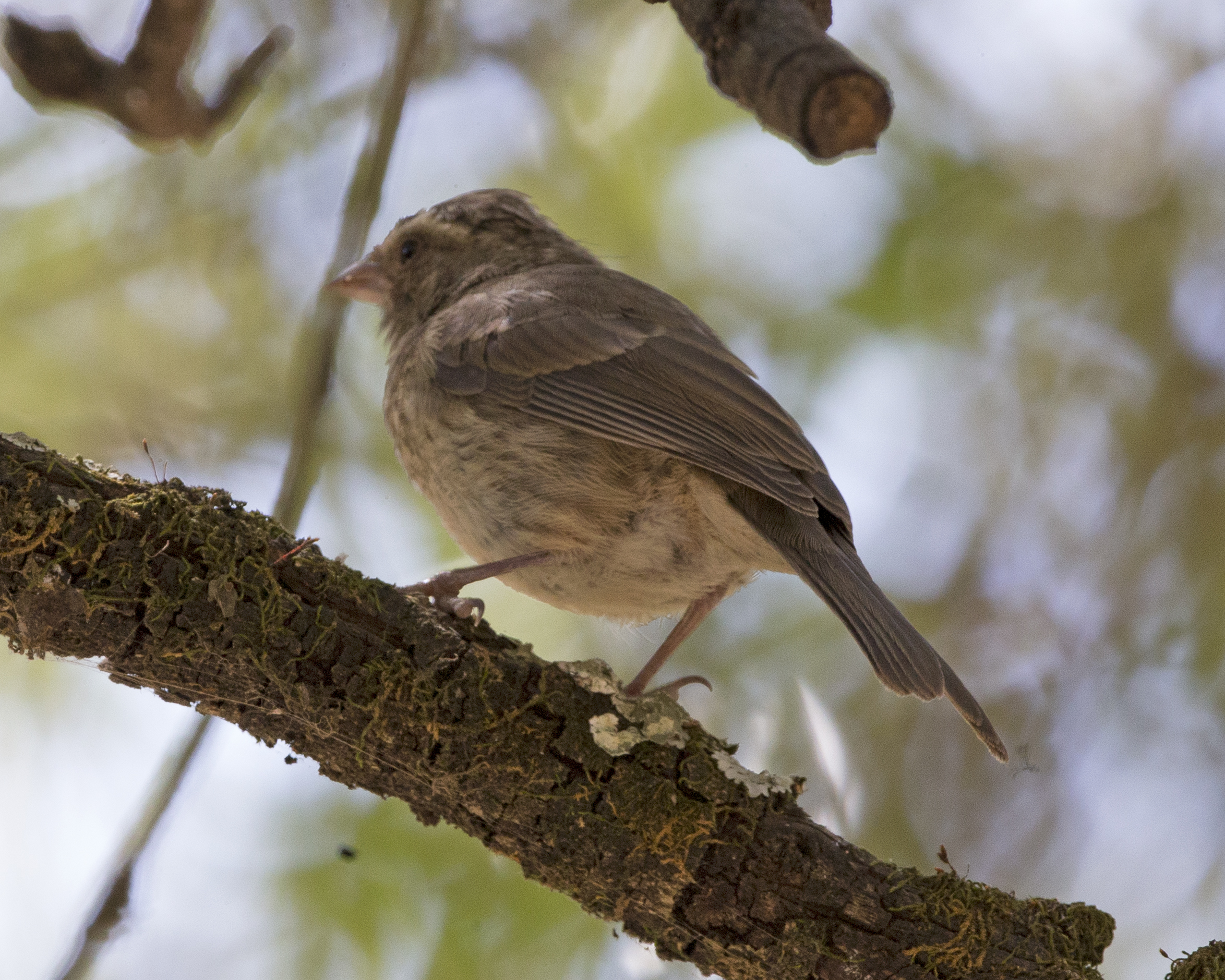 Reichard's Seedeater ( Serinus reichardi) Reichard's Seedeater Serinus reichardi Serinus reichardi striatipectus For different view Debre Libanos, Ethiopia 16th. January 2015 CF2P9780